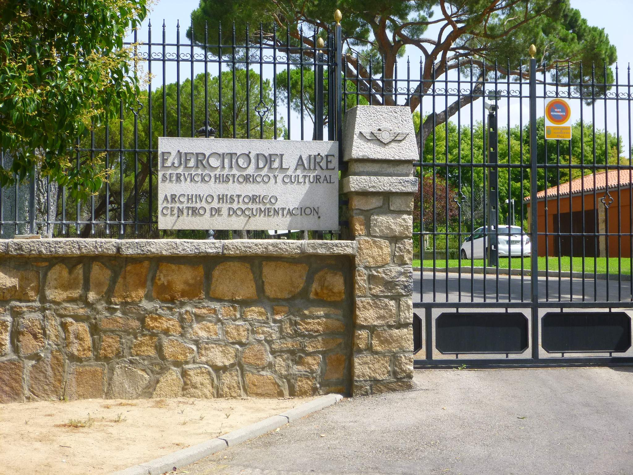 Villaviciosa de Odón - Castillo (Archivo Histórico del Ejército del Aire, AHEA)